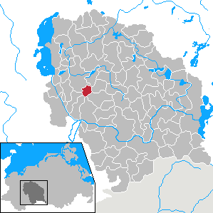 Zapel in Mecklenburg-Vorpommern - District Parchim